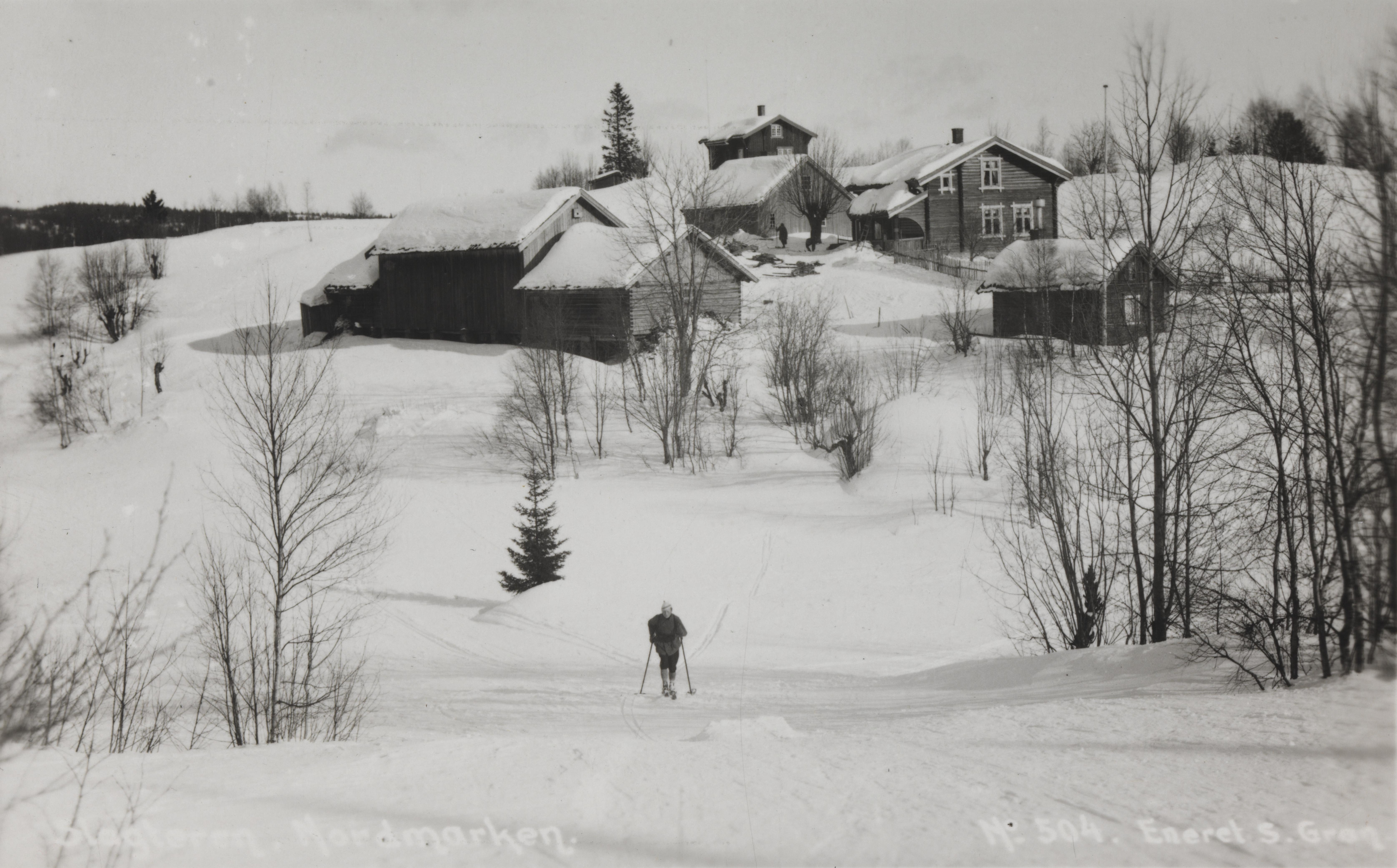 Bildet er hentet fra Nasjonalbibliotekets bildesamling Nordmarka,Slaktern, Oslo, Oslo